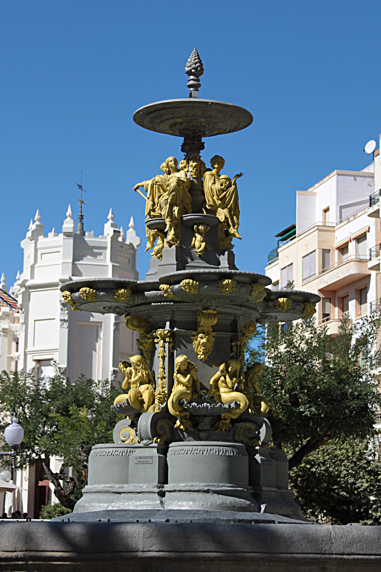 Fuentes de las Musas, Huesca